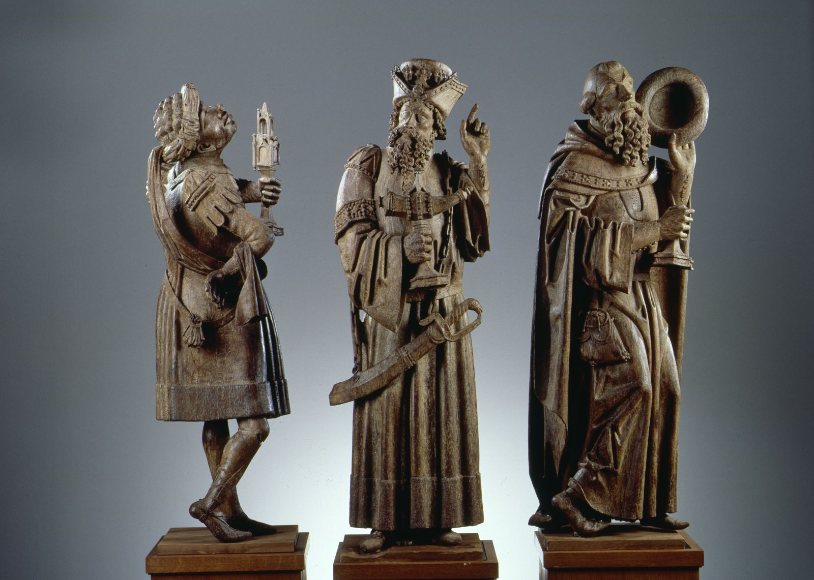 Datierung: um 1490 Ort: Nördliche Niederlande Material/Technik: Eichenholz, Fassung abgelaugt Maße: H. 137 cm, B. ca. 50 cm, T. 36 cm im Germanischen Nationalmuseum in Nürnberg (Sammlung: Skulptur bis 1800)